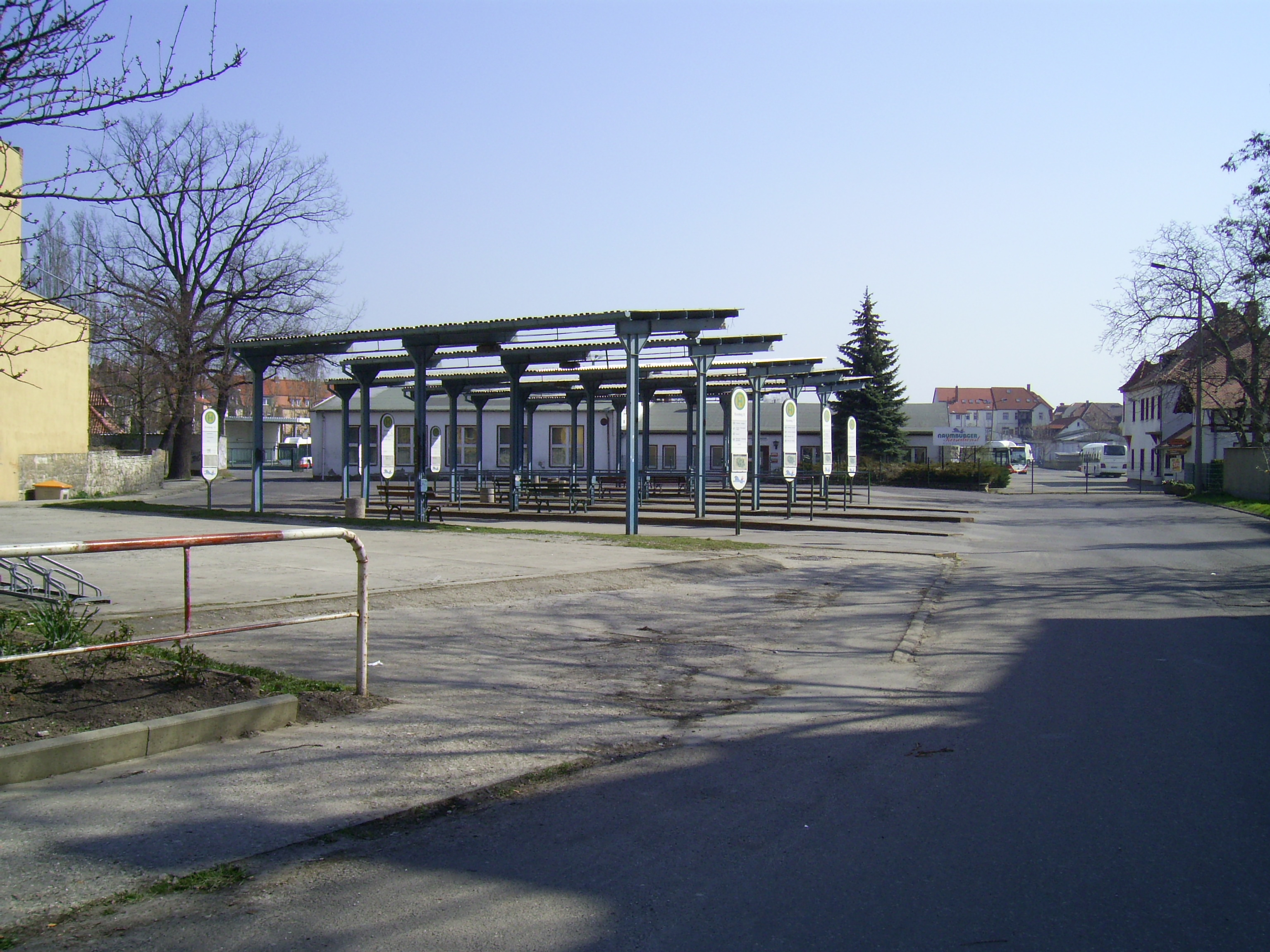 Zentraler City-Bus-Stop (früher ZOB) in Naumburg (Saale), dahinter Betriebshof der PVG Burgenlandkreis mbH